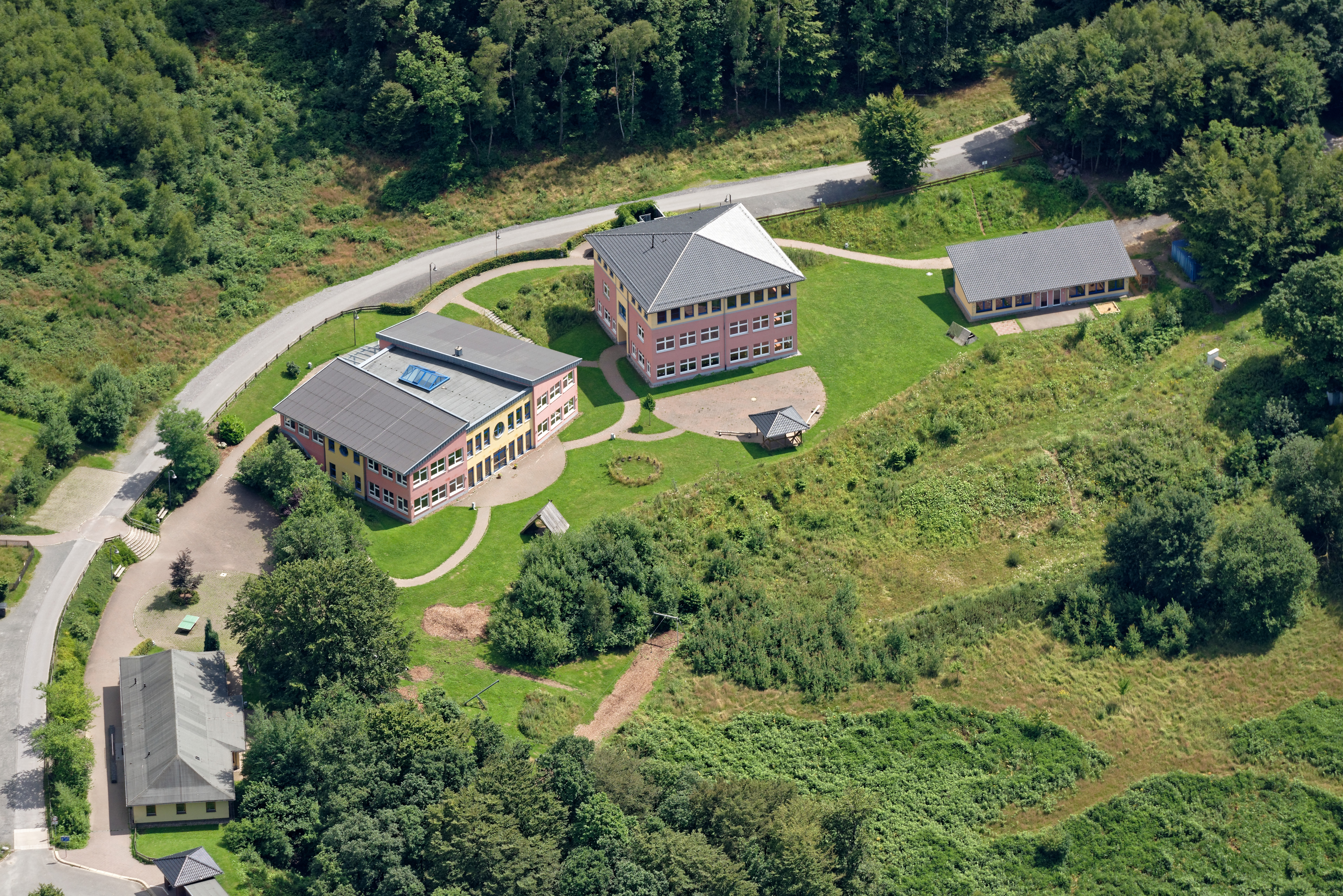 Luftaufnahme: Freie Waldorfschule Neuenrade, Nordrhein-Westfalen